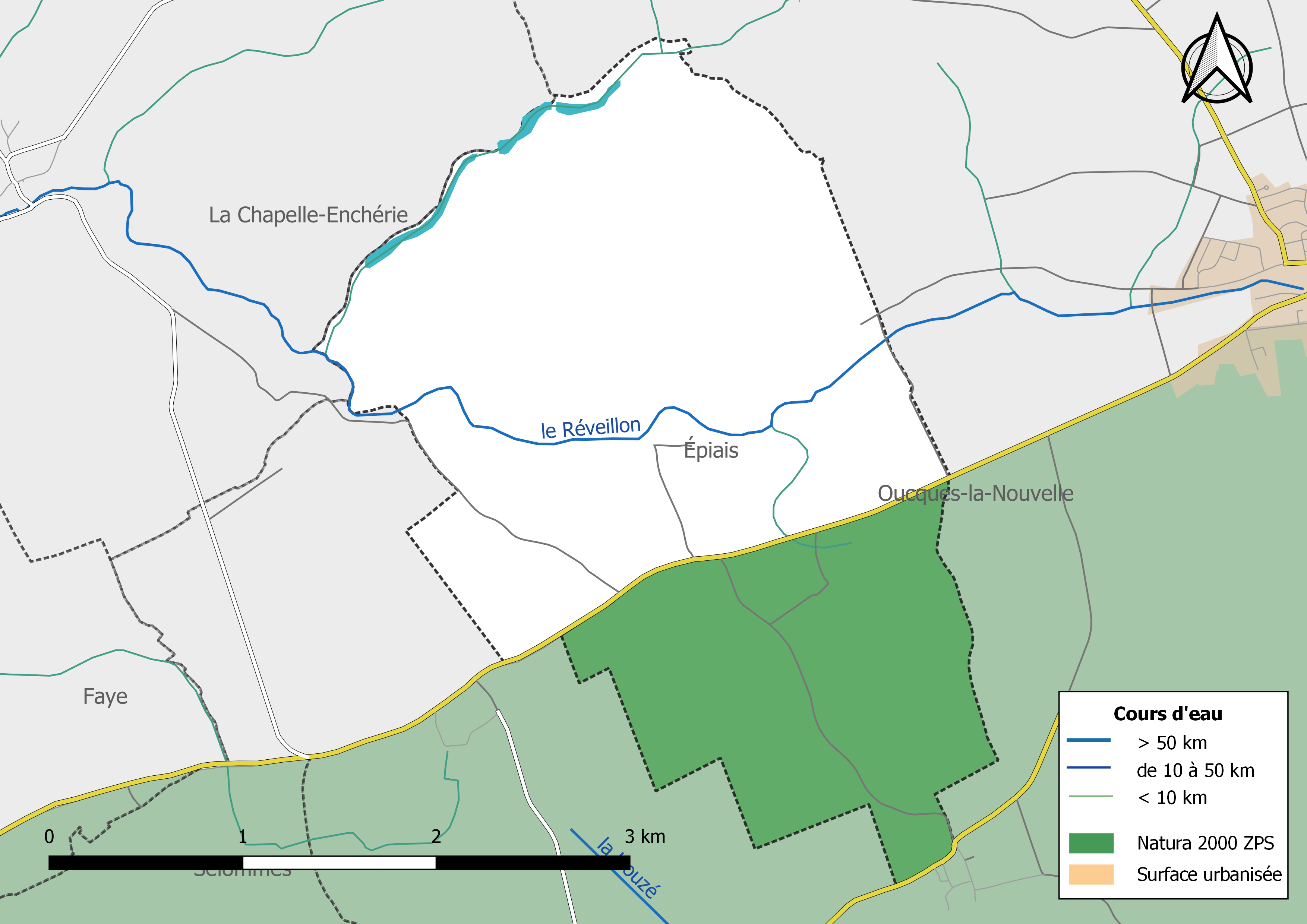 Carte des zones Natura 2000 de type ZPS de la commune de Épiais. (Loir-et-Cher, France).